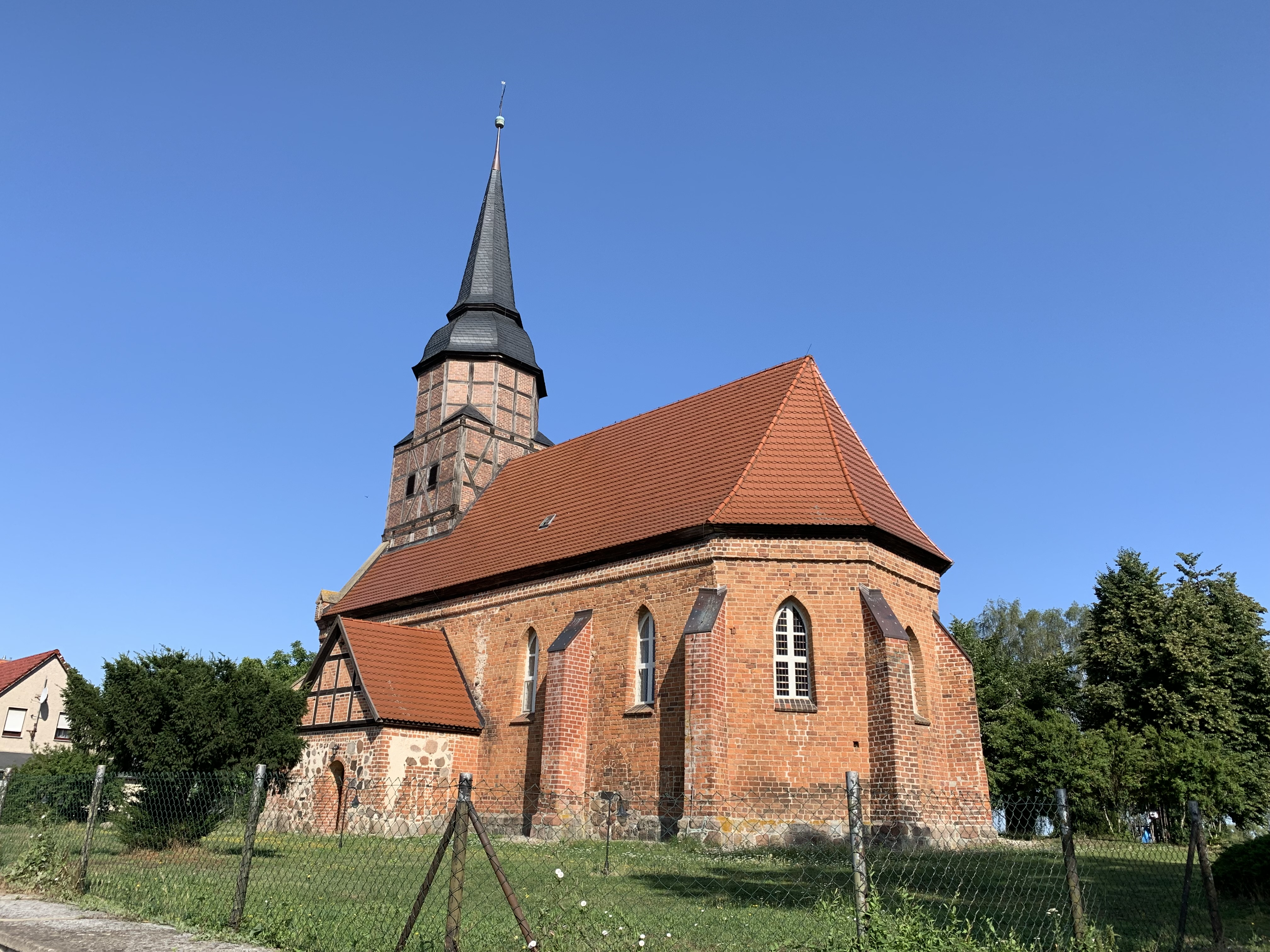 Die Kirche Holzendorf der Gemeinde Groß Miltzow im Landkreis Mecklenburgische Seenplatte ist eine Backsteinkirche aus dem Anfang des 14. Jahrhunderts. Im Innern steht unter anderem ein Altarretabel aus der Zeit um 1730.